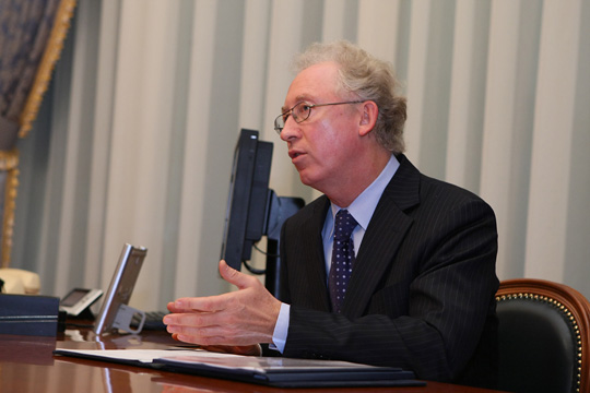 Председатель совета директоров МДМ-Банка О.В.Вьюгин на встрече с Председателем Правительства Российской Федерации В.В.Путиным, 2008 год.